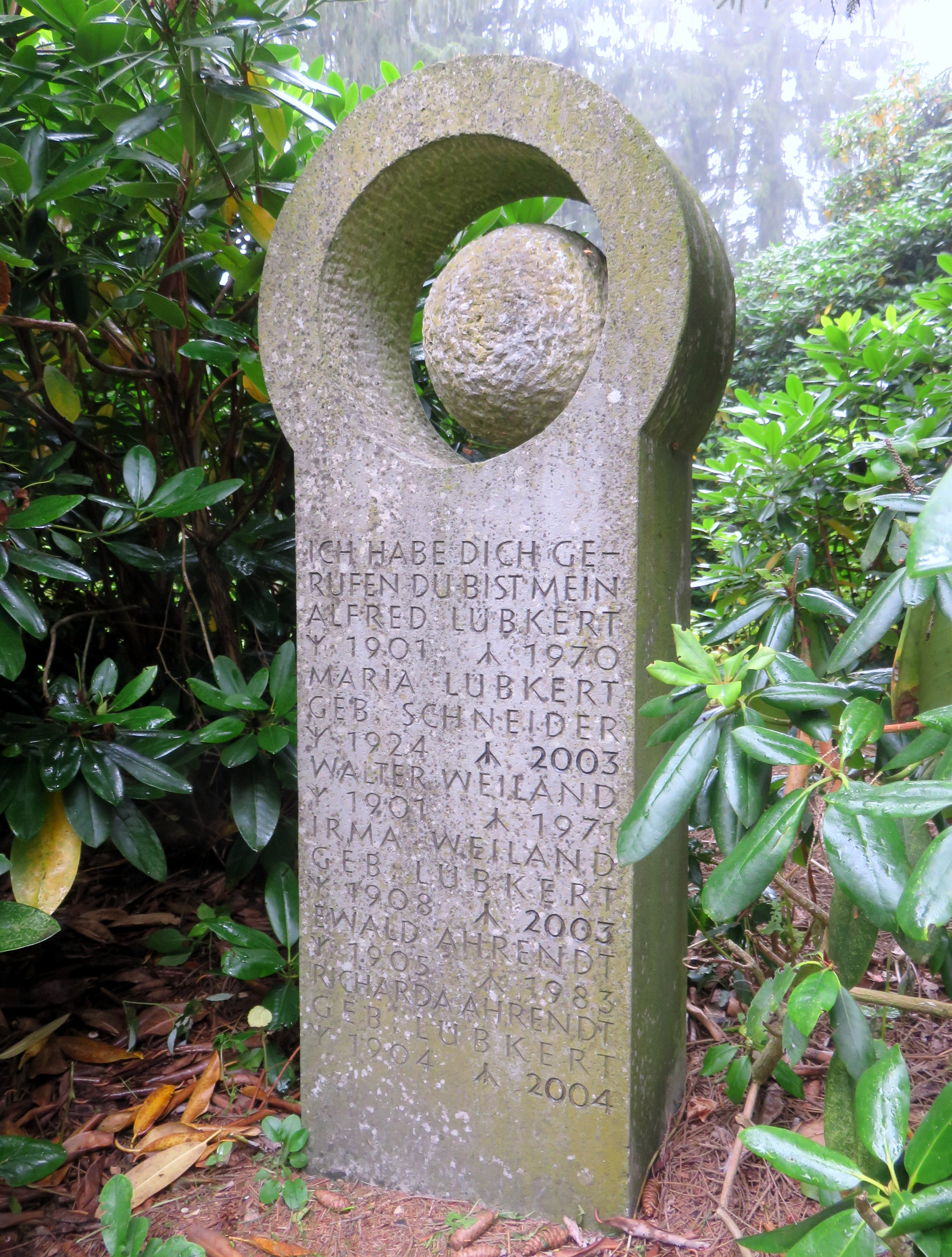 Grabstätte für die deutsche Malerin und Zeichnerin Irma Weiland, Friedhof Ohlsdorf, Planquadrat X 25 (nordöstlich Kapelle 2).